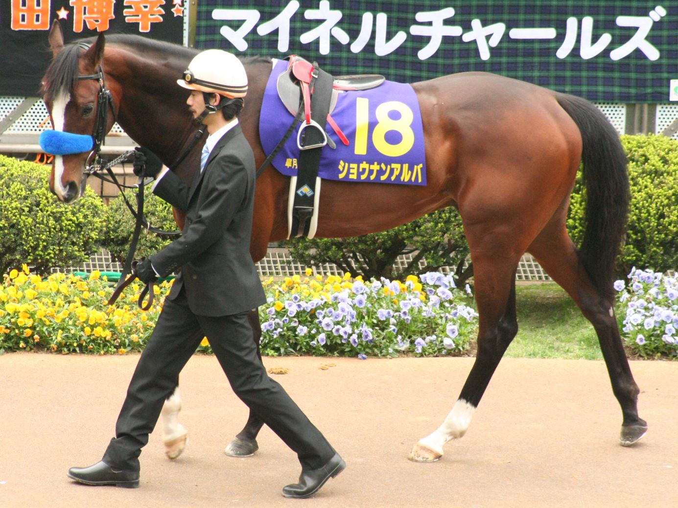 ショウナンアルバ（中山競馬場 第68回皐月賞）